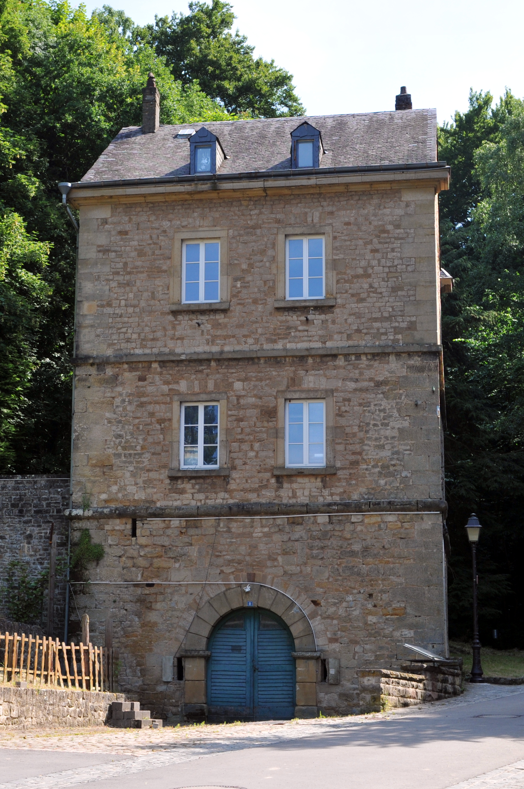 D'Porte du Grünewald gouf 1684 ënner dem Vauban an der Hiel (rue des Trois Glands) gebaut. Iwwer Verdeedegungsmauere gouf d'Paart no lénks mam Fort Niedergrünewald an no riets mam Fort Obergrünewald verbonnen. D'Paart steet um Wee vu engem fréiere Kiem dee Lëtzebuerg mat Tréier verbonnen huet. De Kiem gouf 1732 ofgedroe well en duerch seng héich Lag eng natierlech Protectioun fir eventuel Envahisseure gebueden hätt. D'Gebäi a senger haiteger Form ass vun 1837 an d'Wierk vu preisesche Festungsbauer.